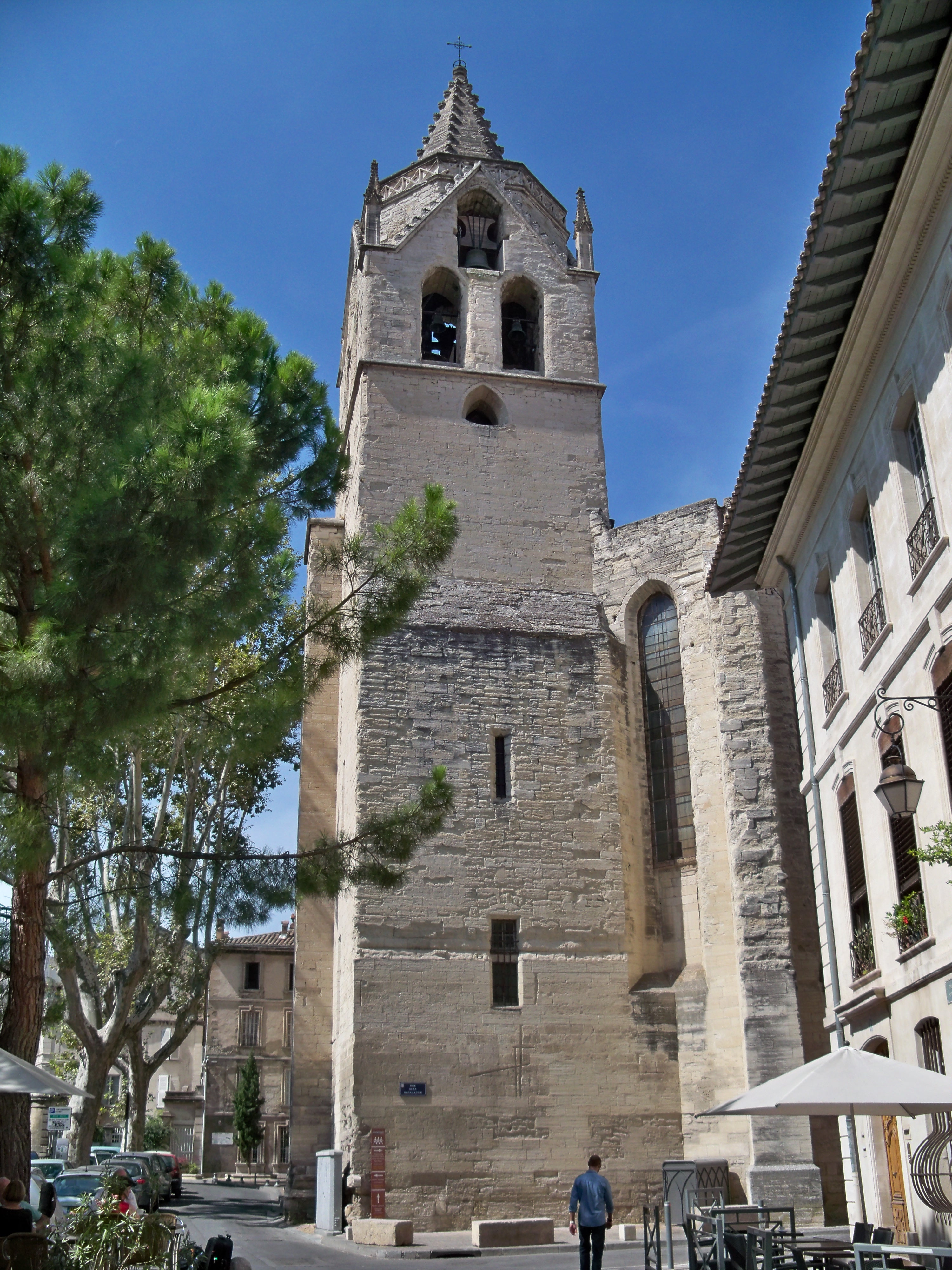 Clocher de l'église Saint Didier, Avignon, Vaucluse, France